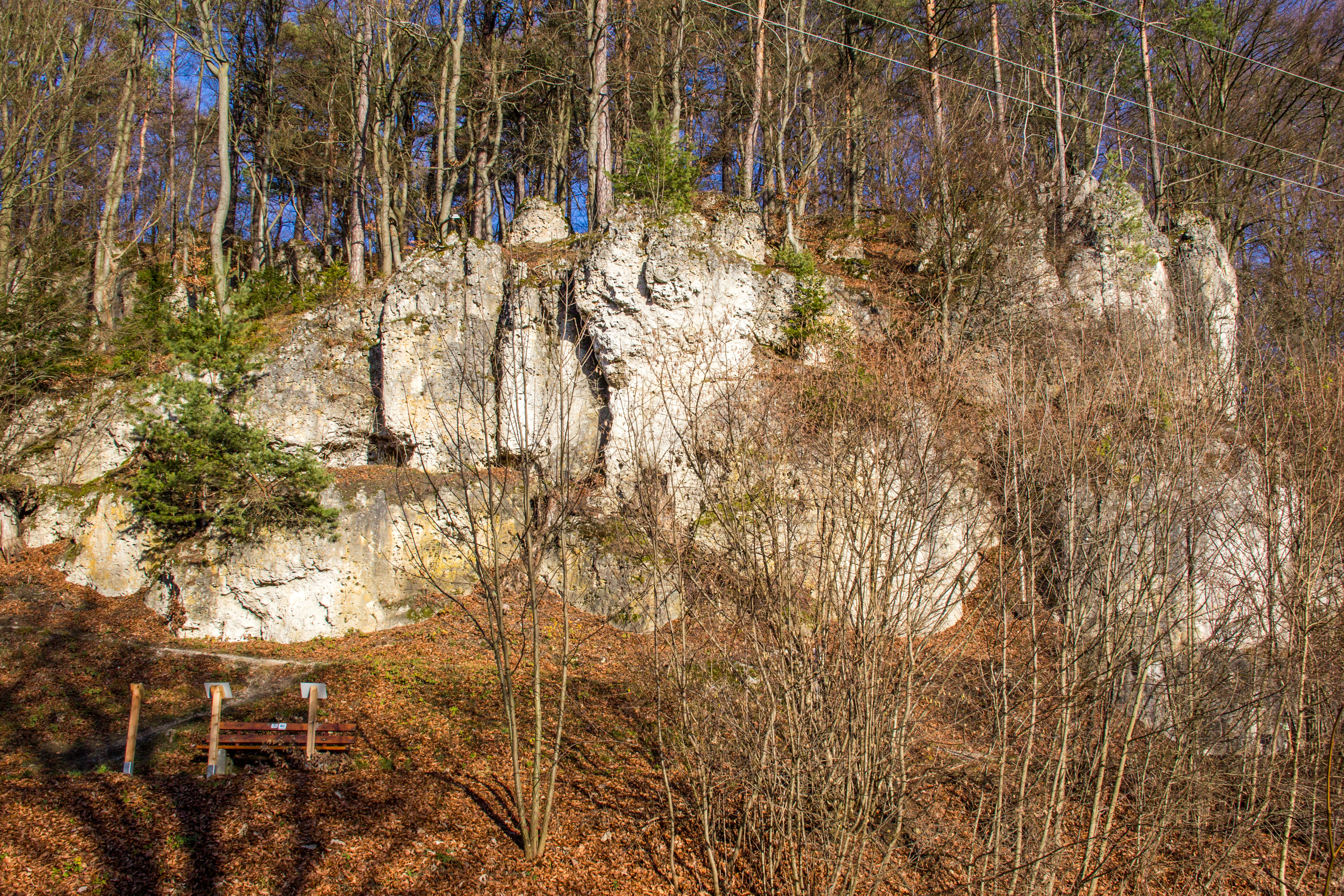 Stiefelfelsen bei Betzenstein, Geotop